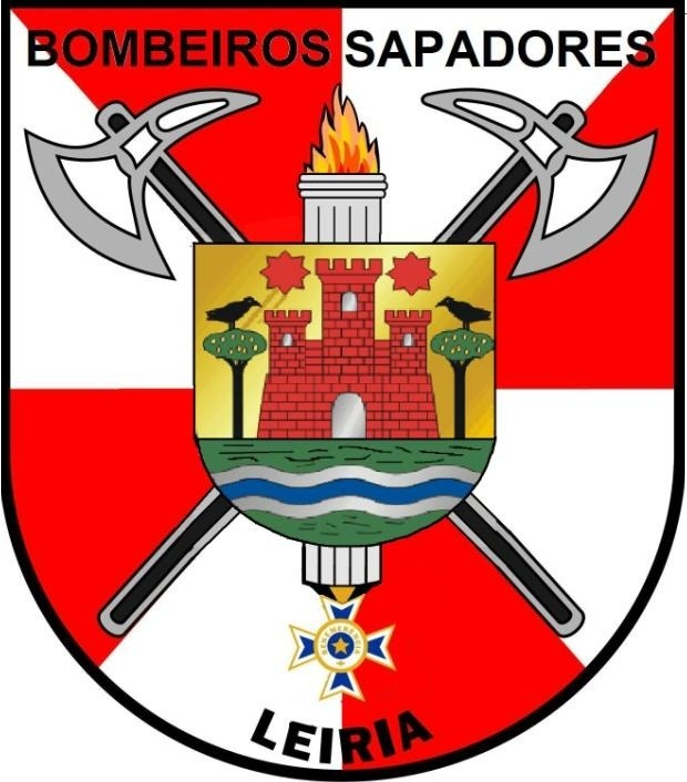 Heraldica do Corpo de Bombeiros Sapadores de Leiria